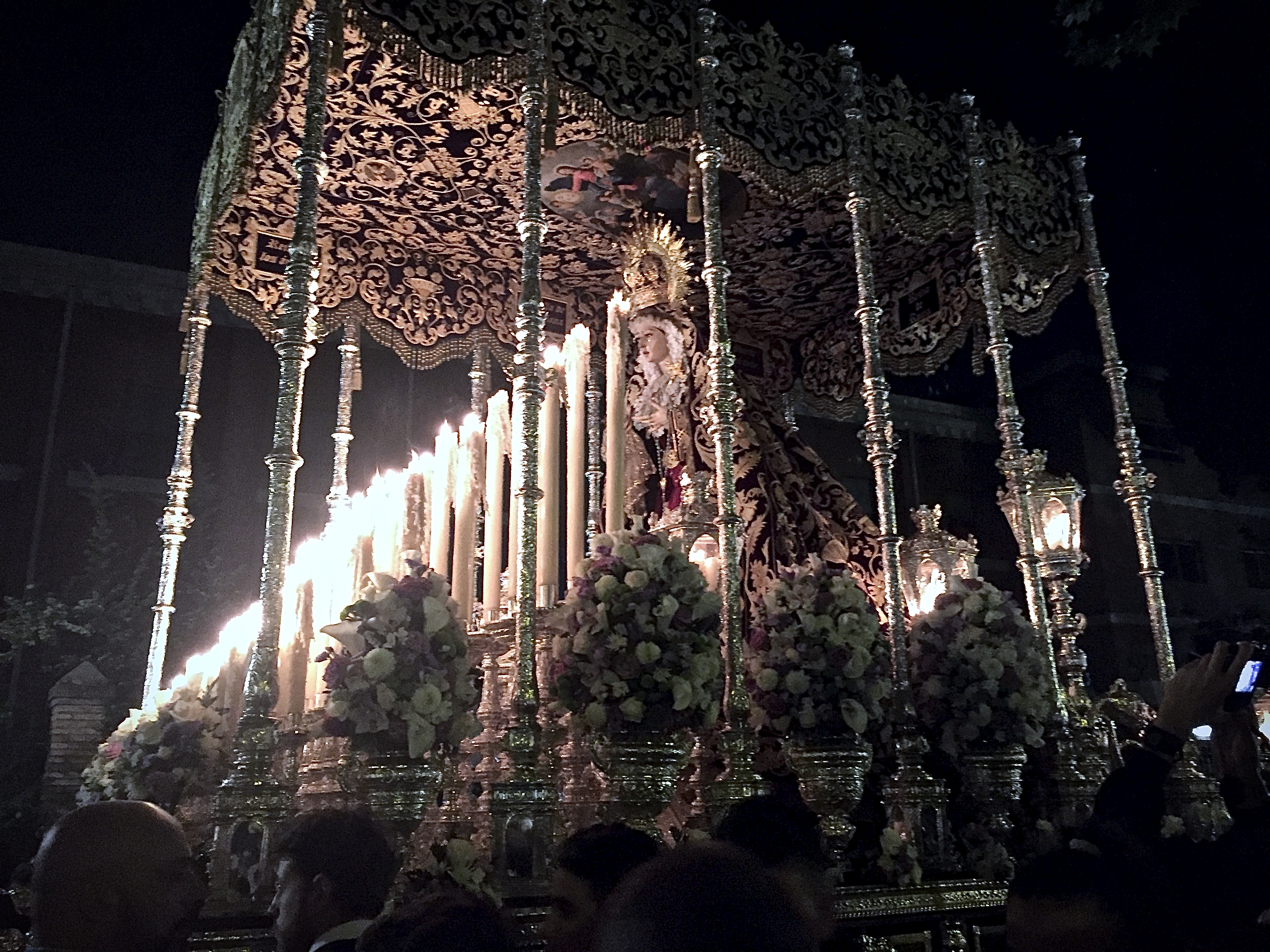 mayor dolor granada